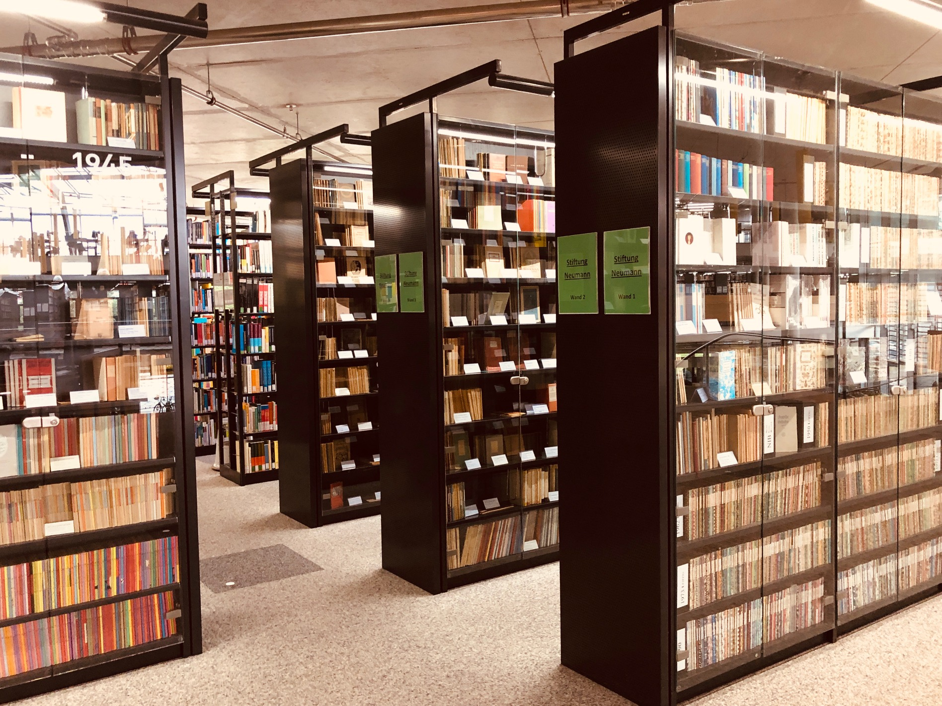 Abgebildet ist ein Teil der Sammlung der Neumannstiftung in der Universitaetsbibliothek Magdeburg.